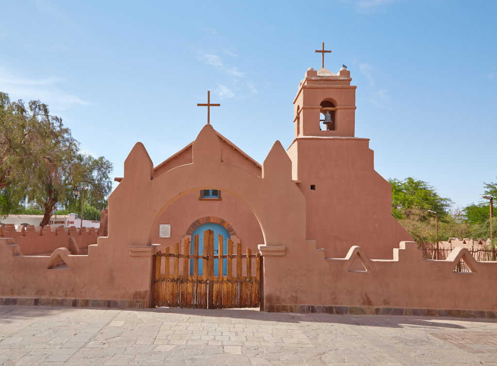 Iglesia de San Pedro